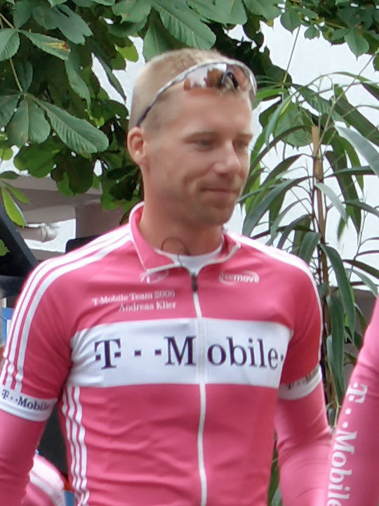 Andreas Klier at Sparkassen Giro Bochum